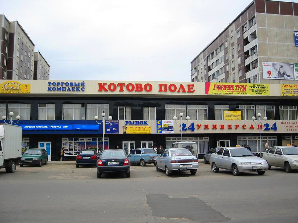 Микрорайон «Котово Поле», центр.